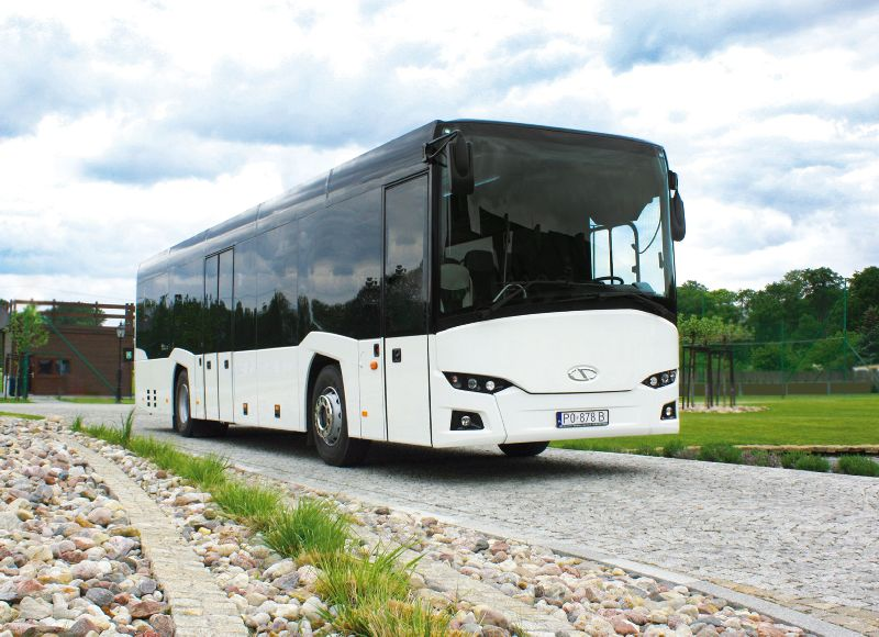 InterUrbino